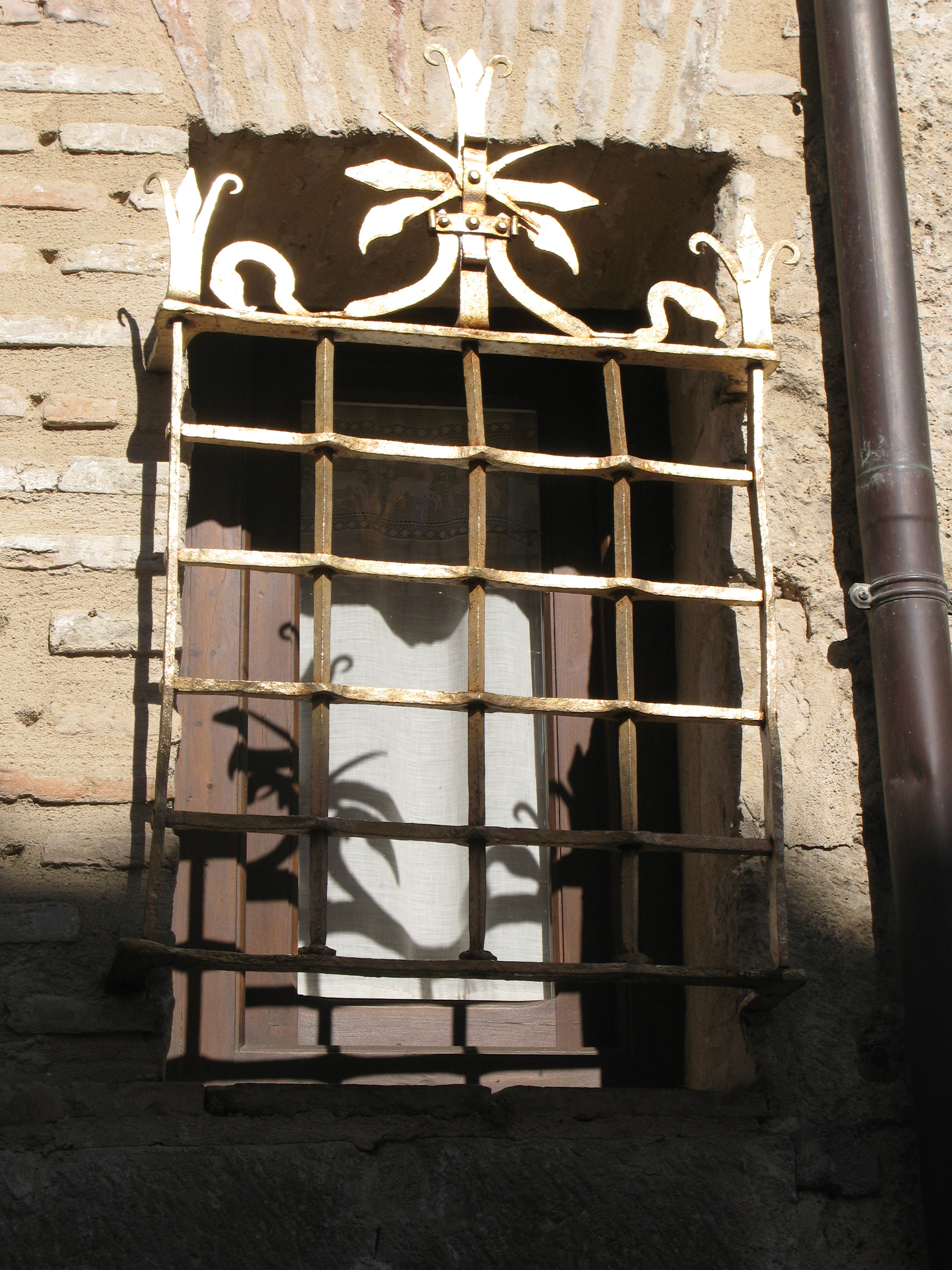 La Reja Dorada en la ciudad de Toro(provincia de Zamora, España)